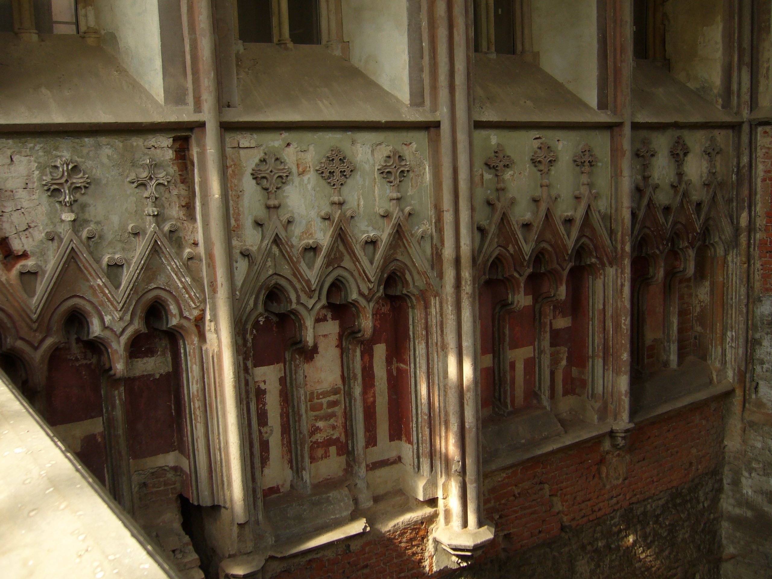 Kaplica zamkowa w Raciborzu, wnętrze fragment wystroju architektonicznego na ścianie północnej przed pracami konserwatorskimi